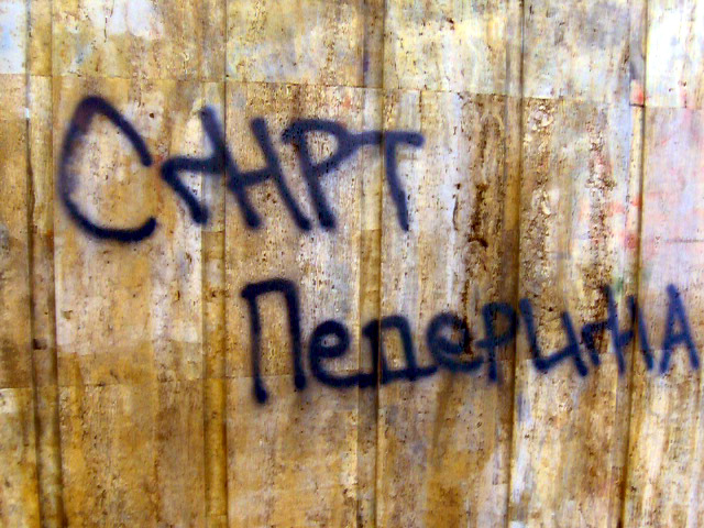 Смрт педерима, графит "Образа" у пролазу код Дома Омладине у Београду.